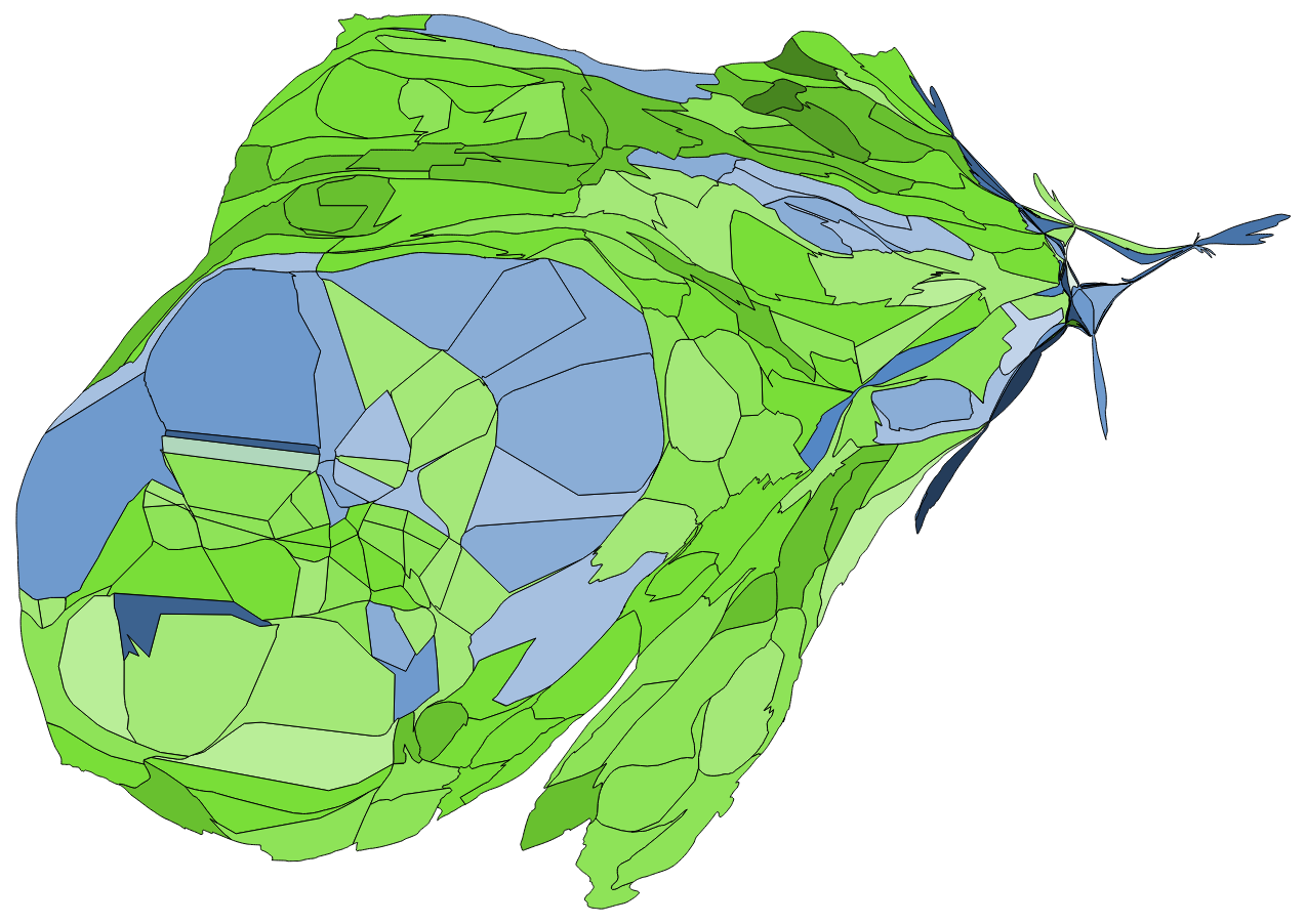 中文（台灣）: 顏色對照表 部分村里因共用投開票所 故圖中部分村里得票為依人口調整後資料 紅色部分為無人投有效票的村里